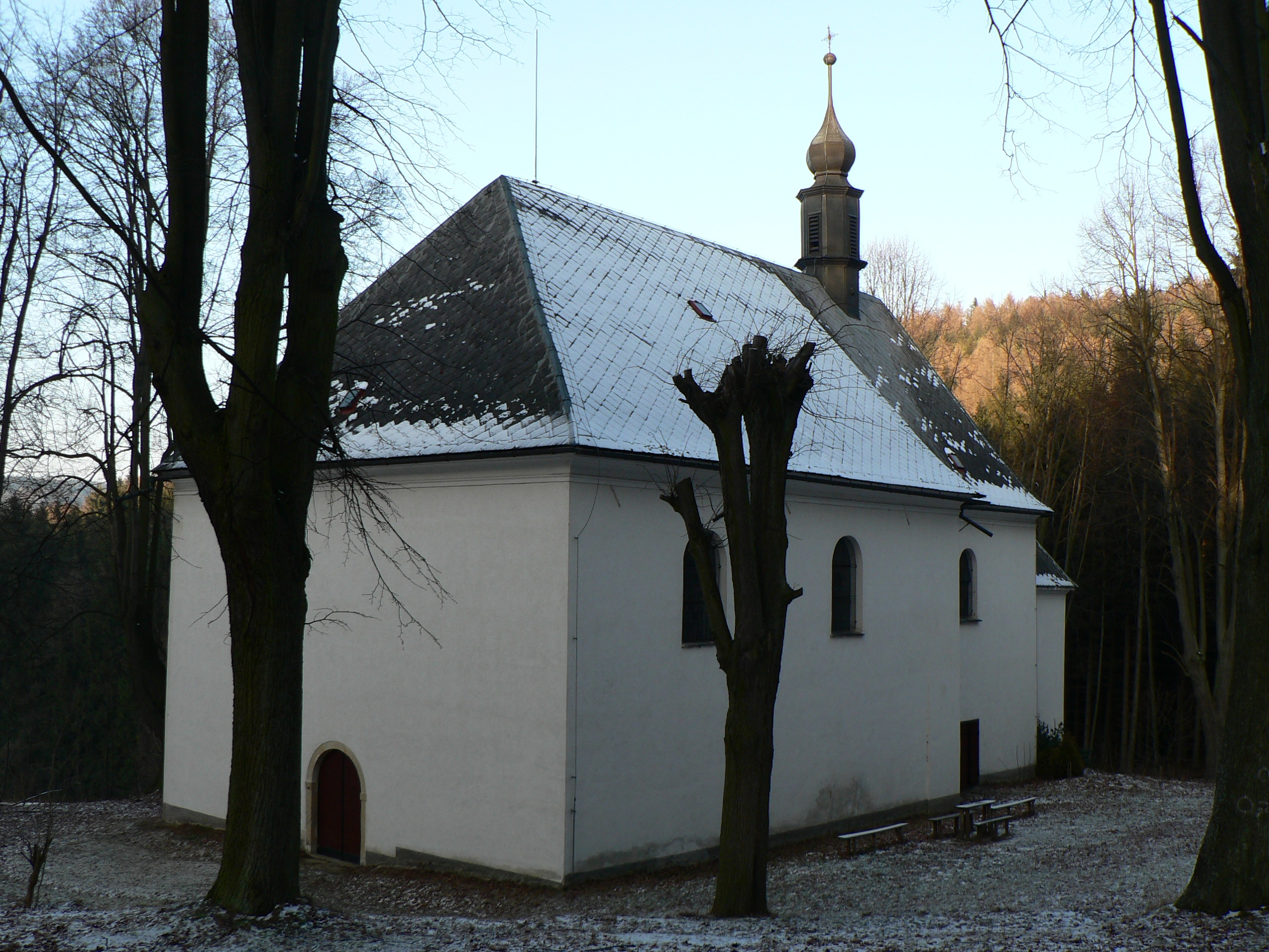 Poutní kostel Božího Těla u Bludova